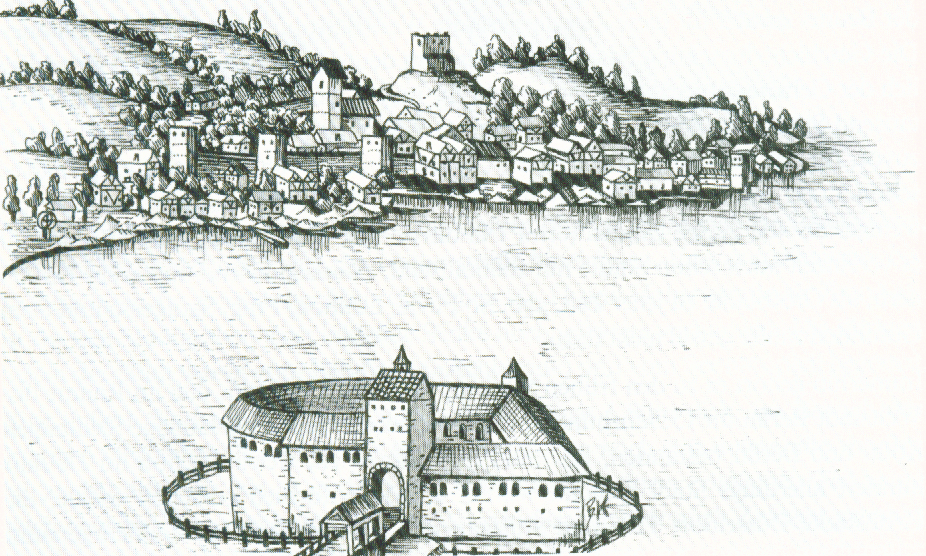 Plan, Gmunden, 1849